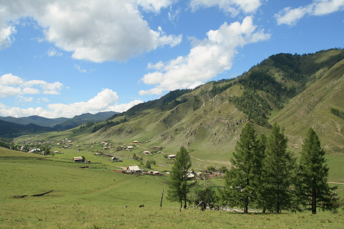 вид села Верхняя Апшуяхта Шебалинского района Республики Алтай